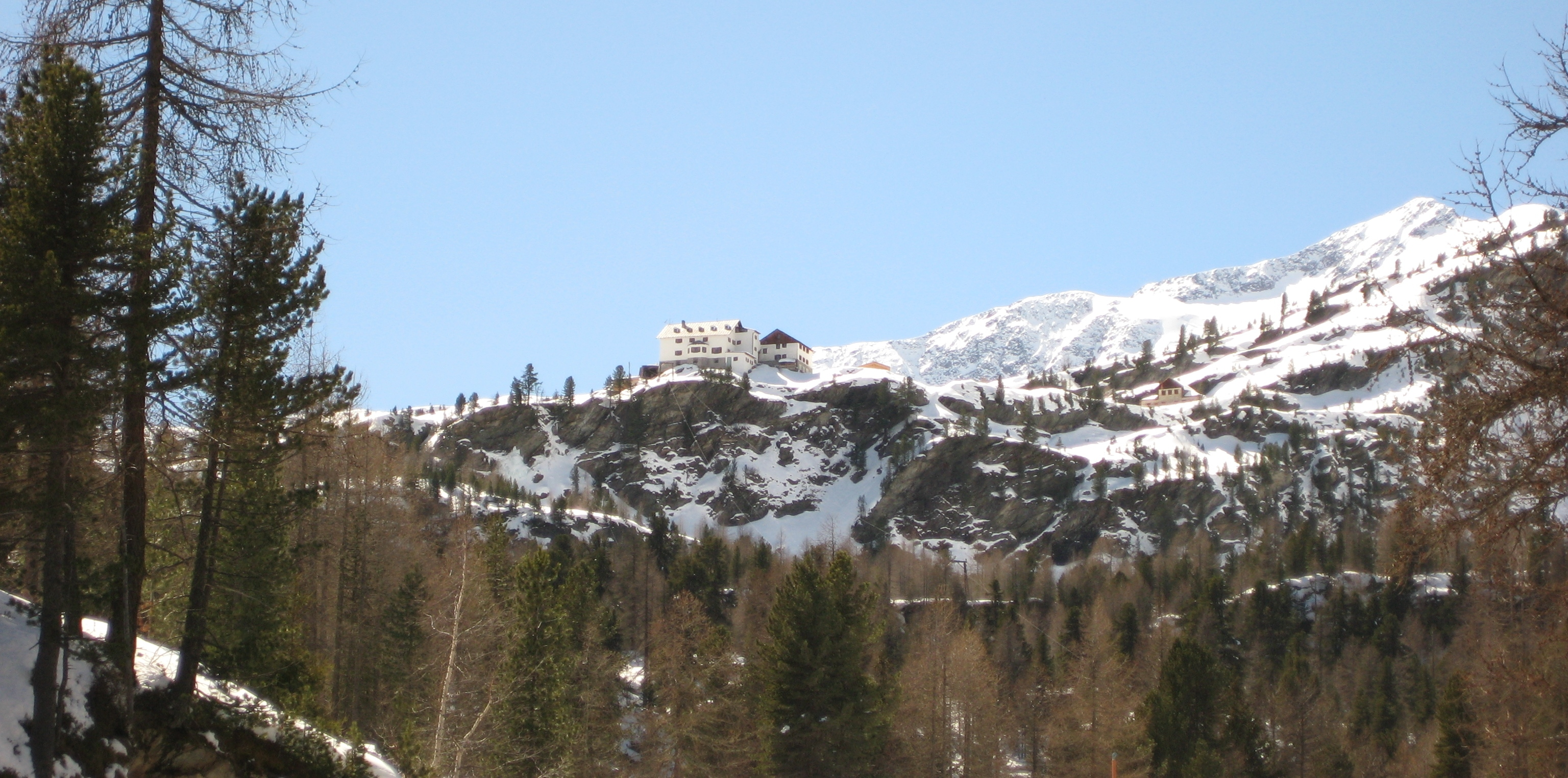 Martelltal, Blick Richtung Süden zum Talende